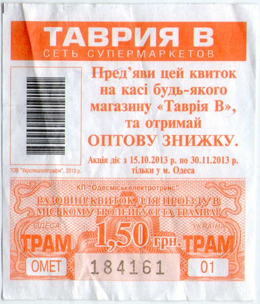 октябрь 2013